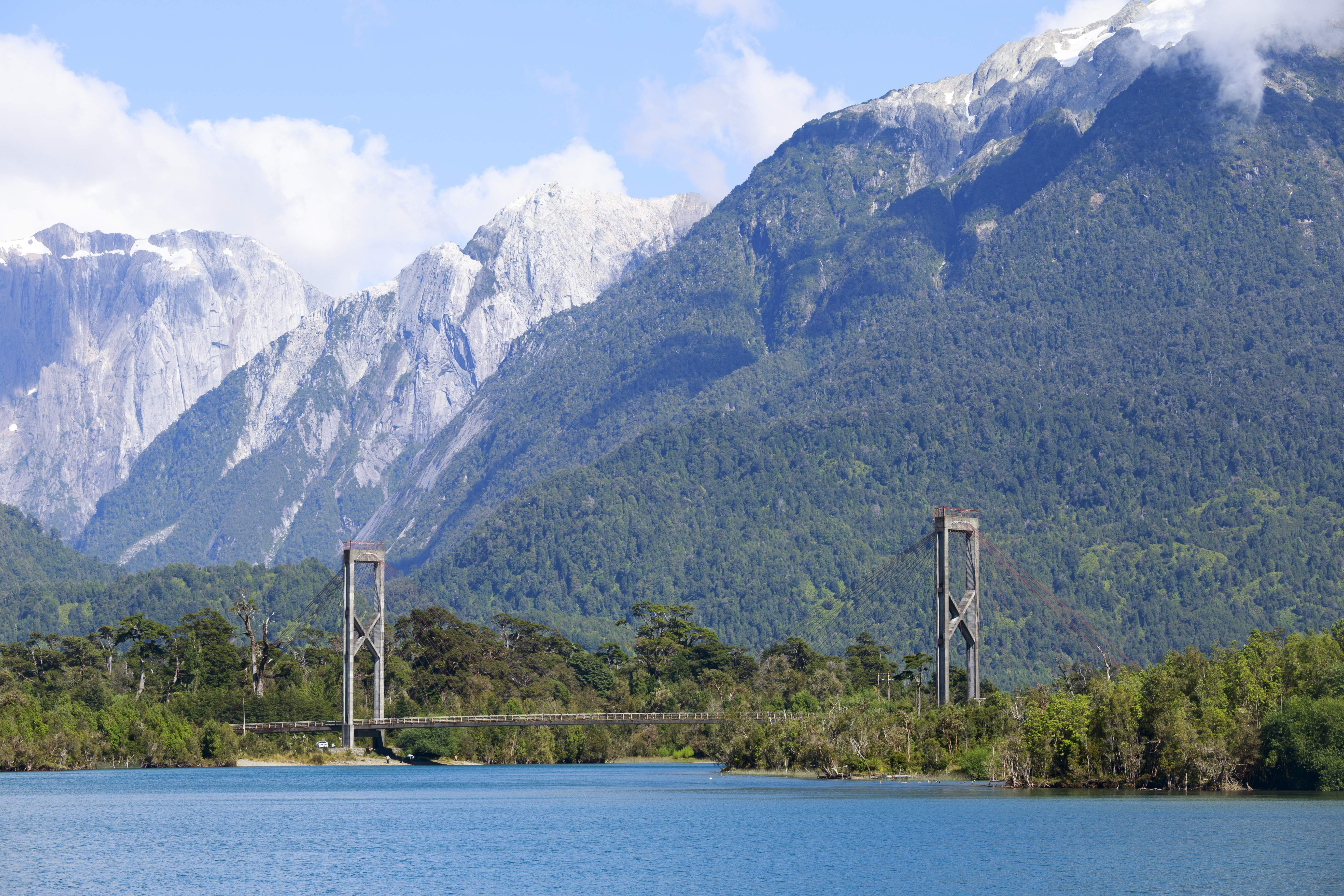 Puente sobre el río Yelcho